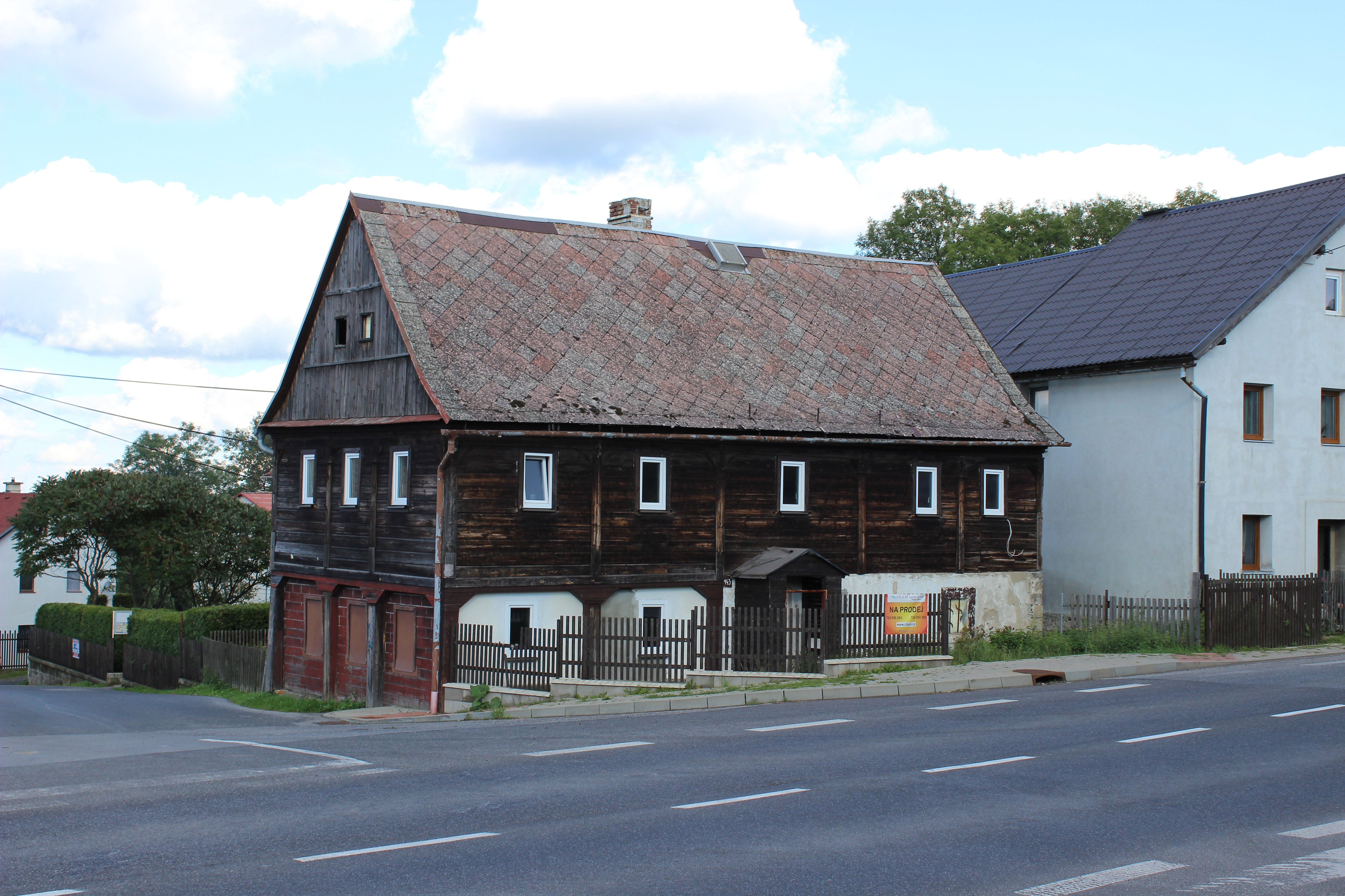 Dům číslo popisné 143 v Huntířově.